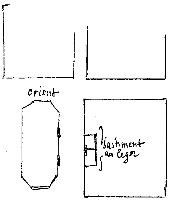 Skizze in einem Brief an René Mahieu zur Hanauer Doppelkirche